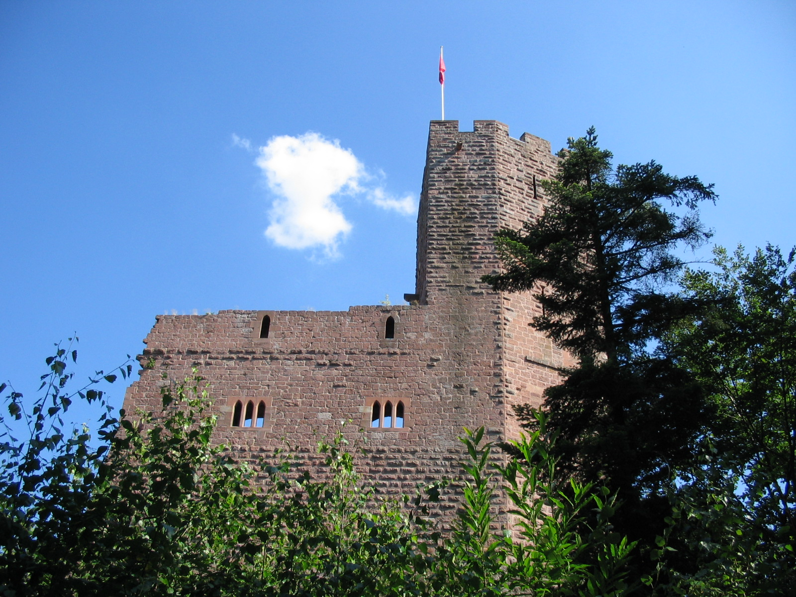 Château de Wangenbourg (XIIIe siècle)